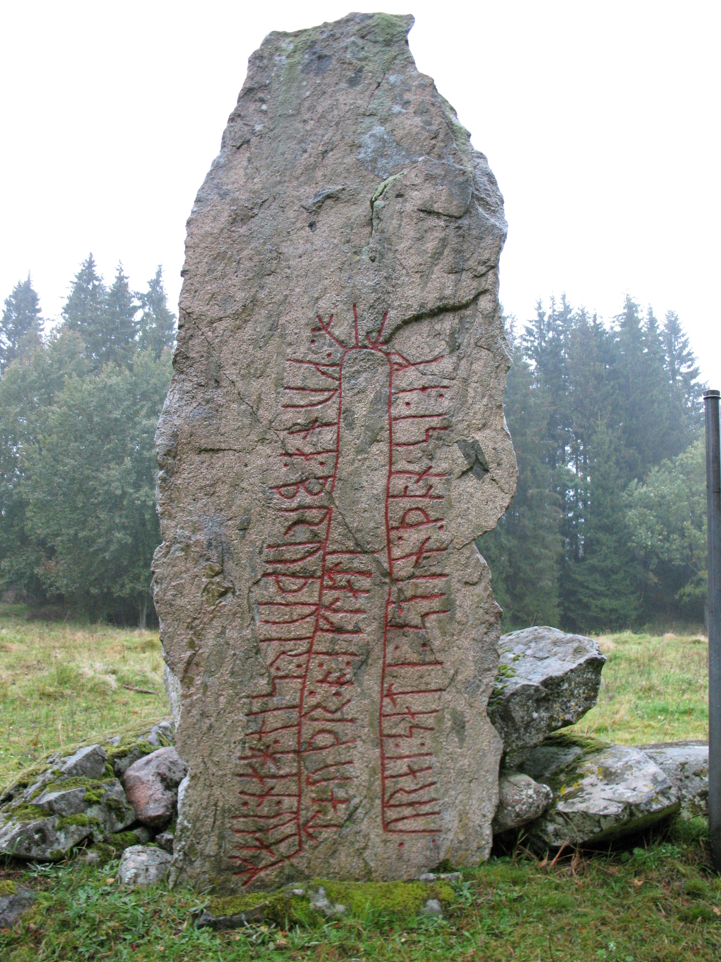 runestone Sm 77